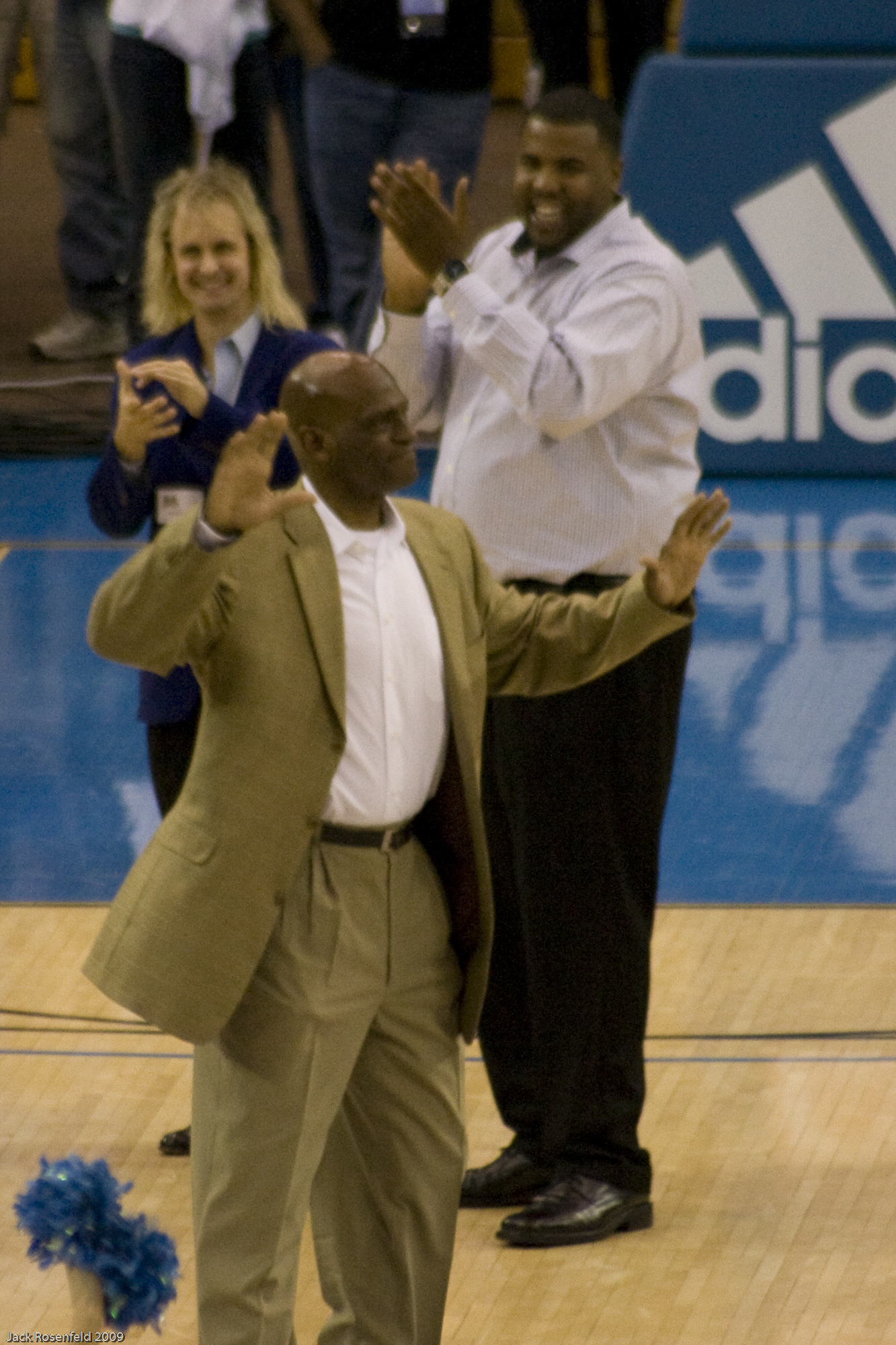 Sidney Wicks